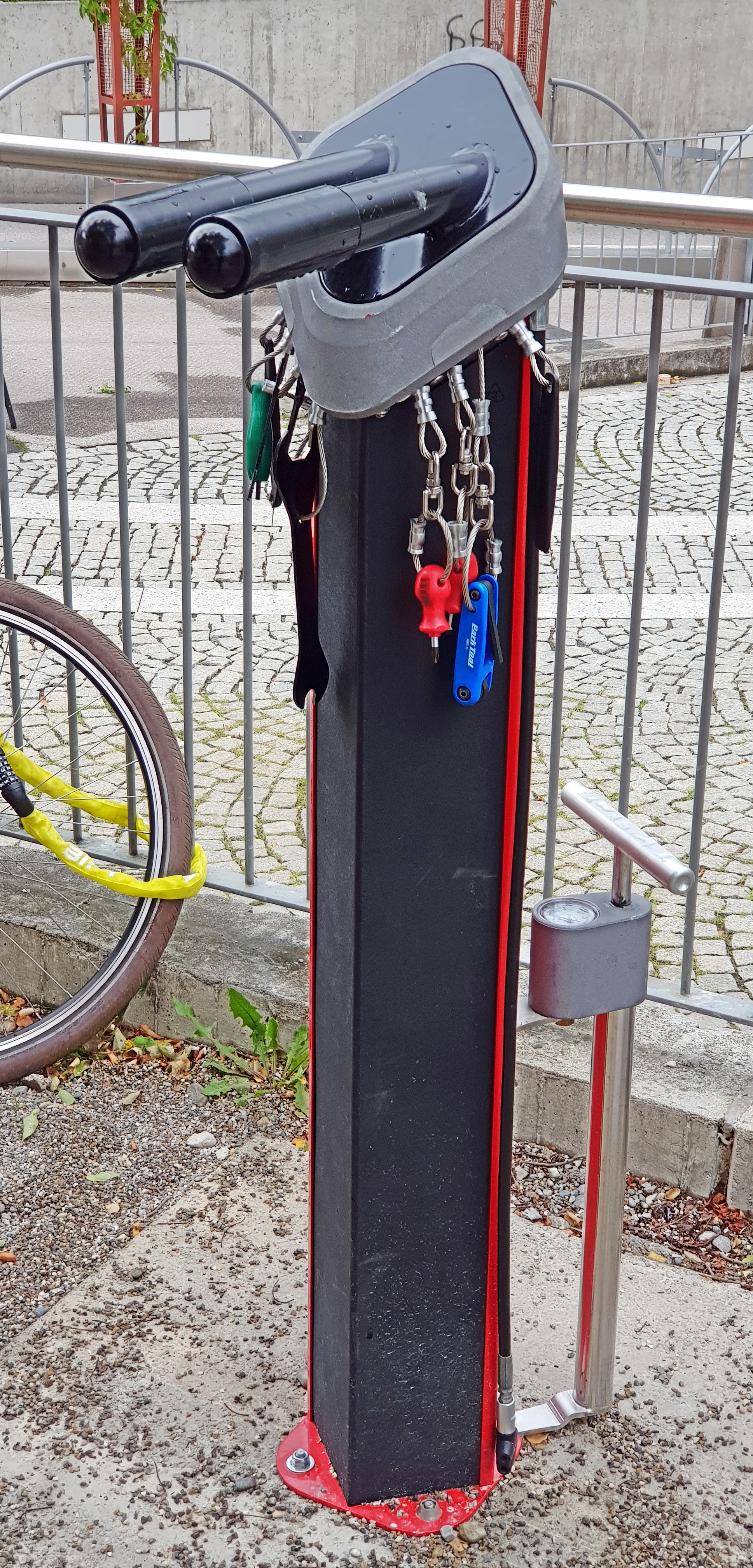 Fahrradwerkzeugsäule am S-Bahnhof in Gröbenzell